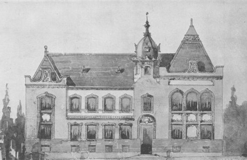 A nagyváradi Berettyó vízszabályozó és ármentesítő társulat székházának meg nem valósult pályaterve, készítette ifj. Rimanóczy Kálmán